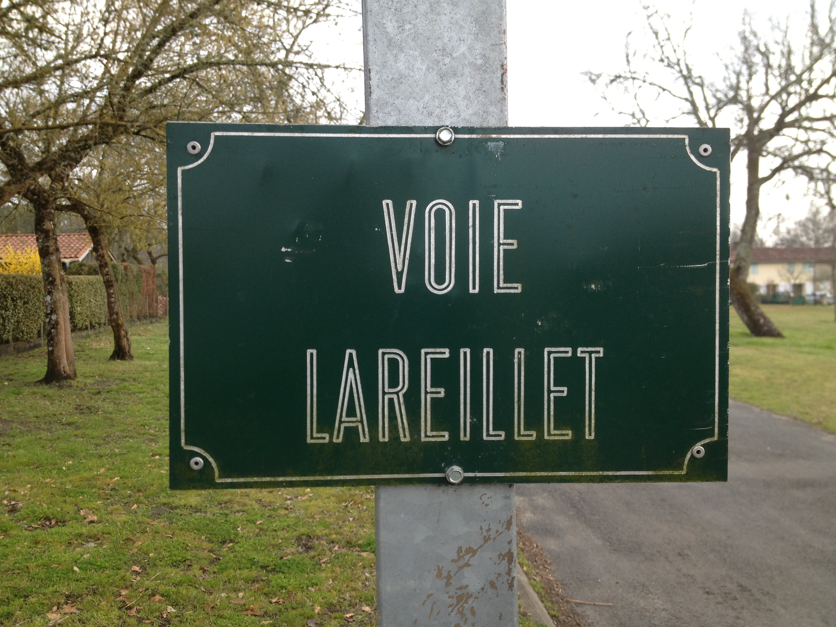 Voie Lareillet (Brocas).